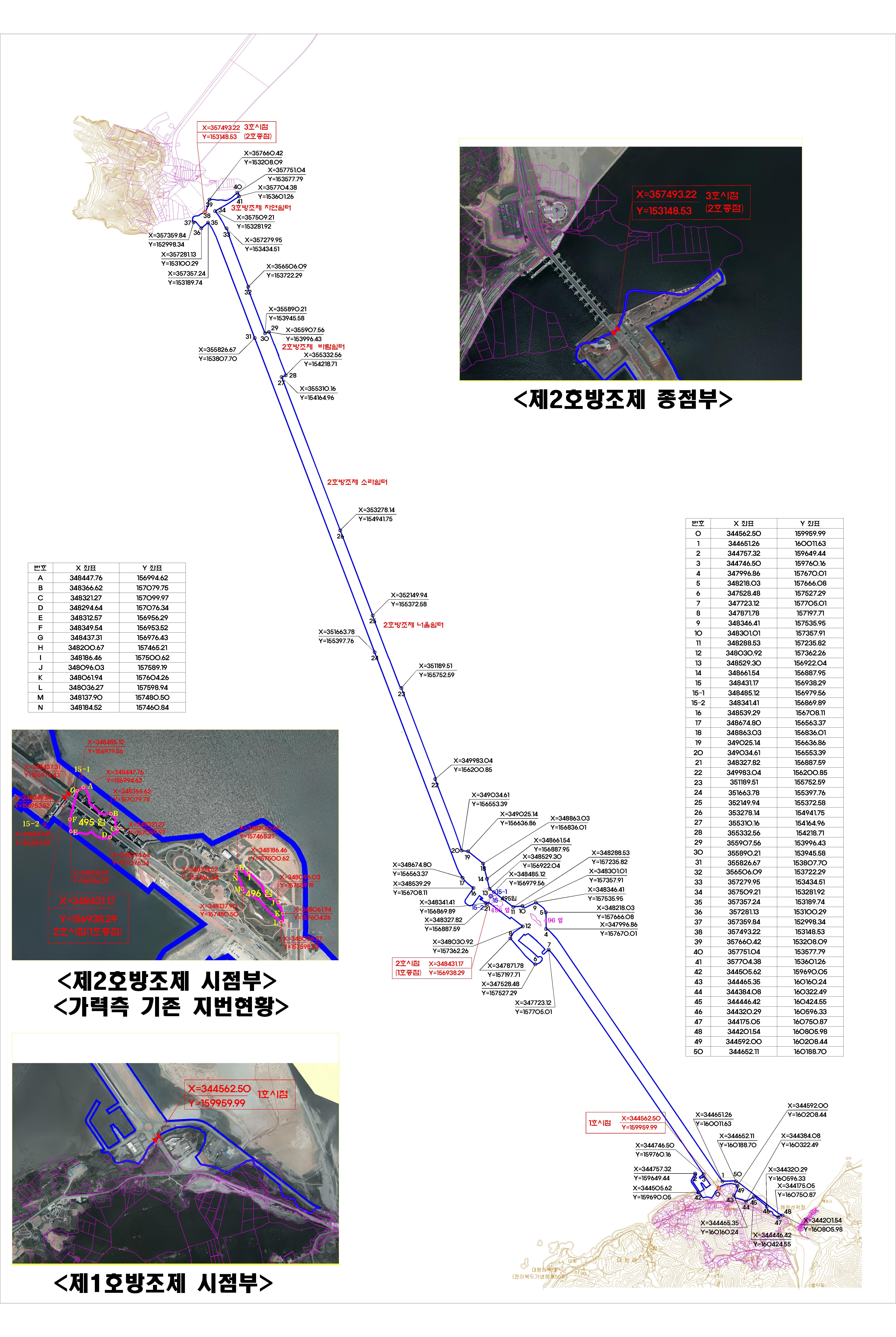 행정자치부 공고 제2015-319호 매립지 등이 속할 지방자치단체 결정 공고 별지에 첨부된 지도.